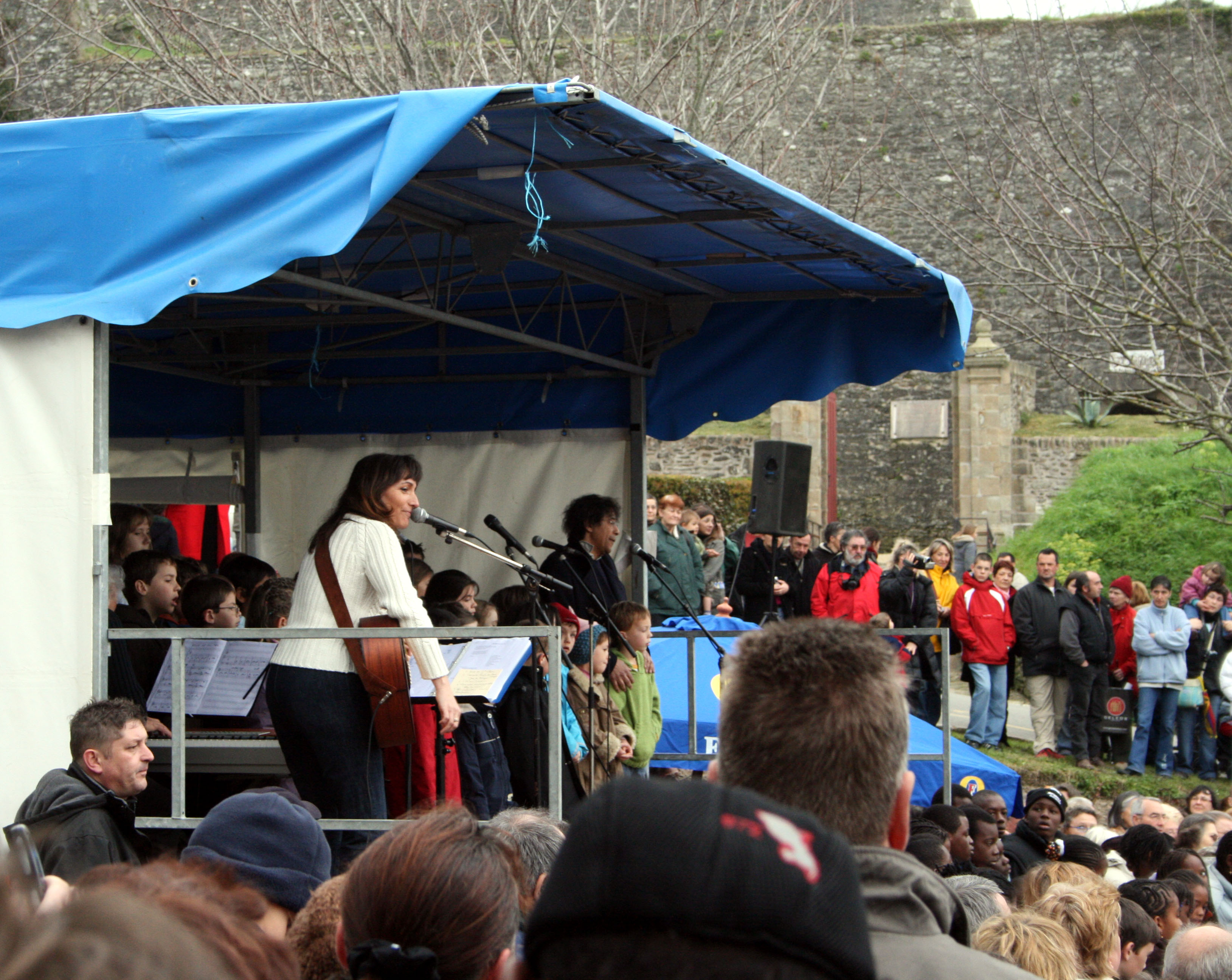 Description =Laurent Voulzy à Belle-Ile lors du Trophée BPE avec la chorale des enfants de Belle-Ile et Marie-Galante Source =Photo taken by Remi Jouan Date =Mars 2007 Author =Remi Jouan